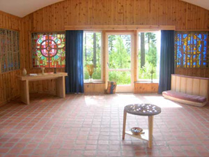 Innifrån kapellet i Kuvarp